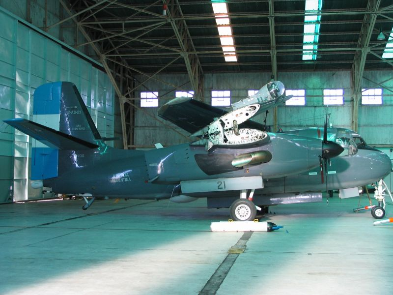 Grumman S-2T Turbo Tracker 2-AS-21, Comando de Aviación Naval, Armada Argentina Martín Otero Base Aérea Comandante Espora May 17, 2005 (Navy´s Day)